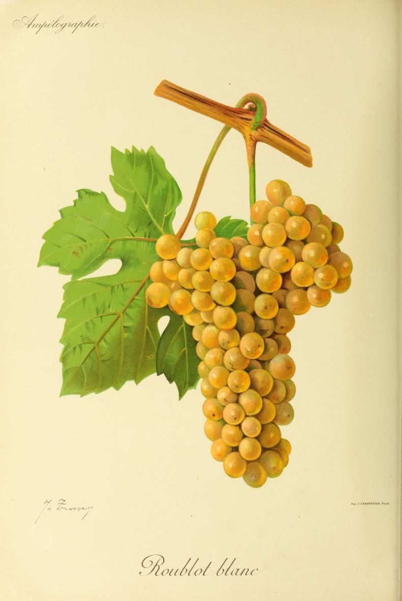 Grappe de Roublot blanc par Viala et Vermorel